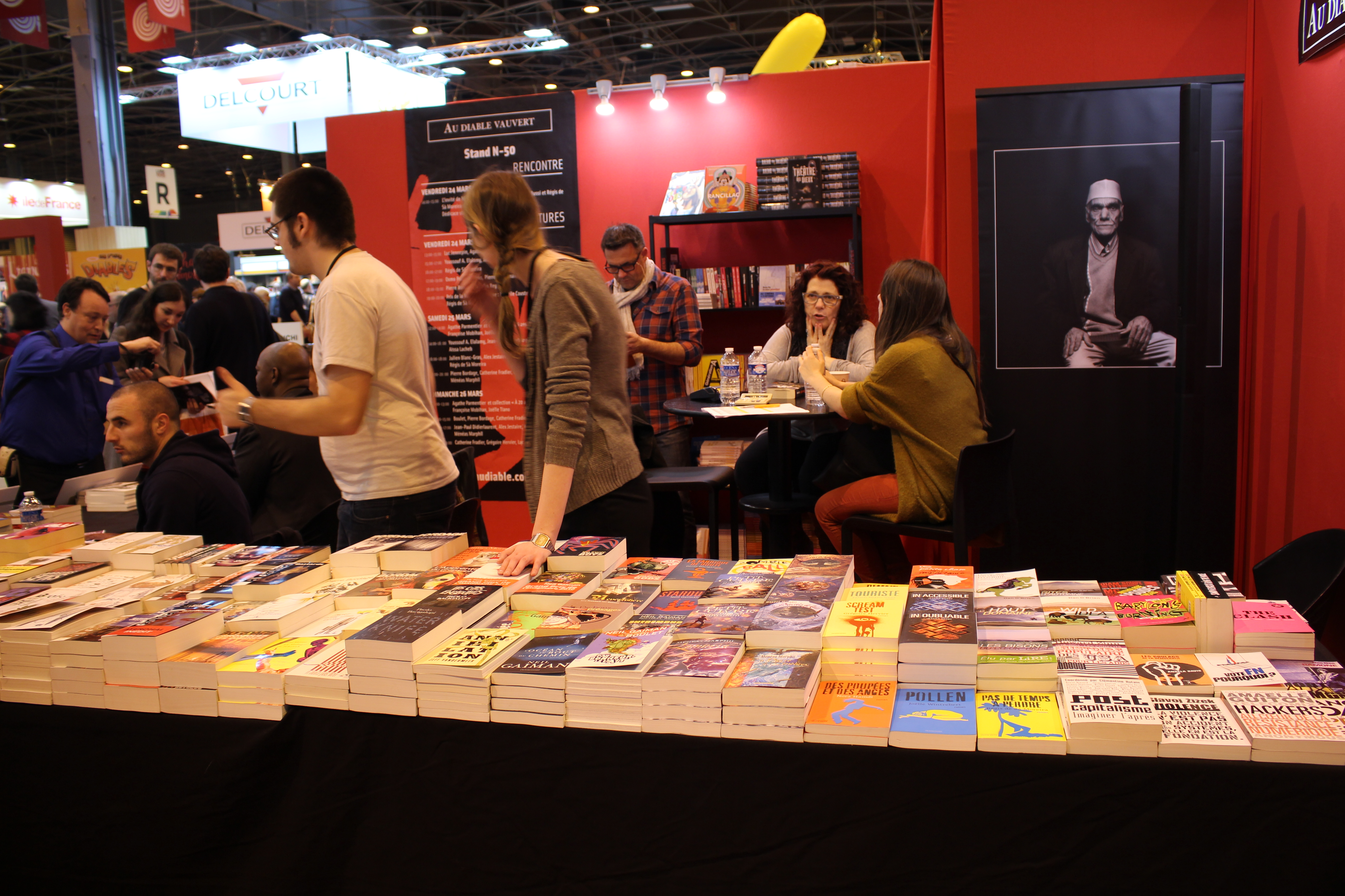 Livre Paris 2017